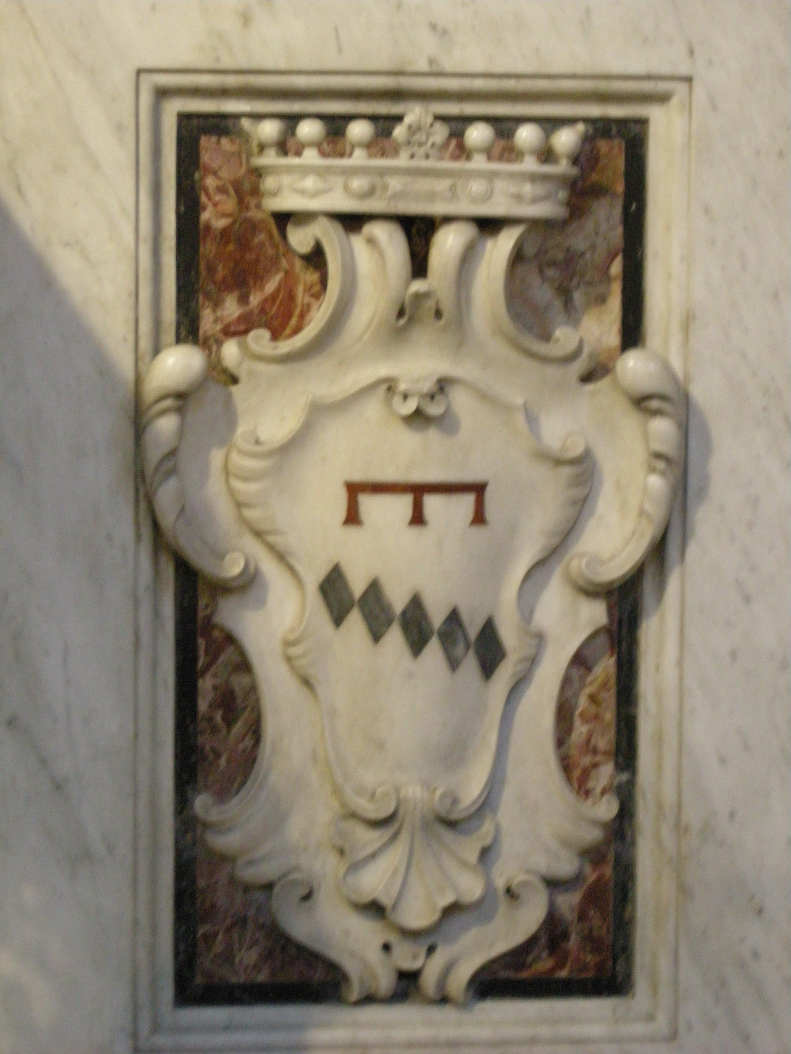 San paolino, transetto dx, stemma rinuccini